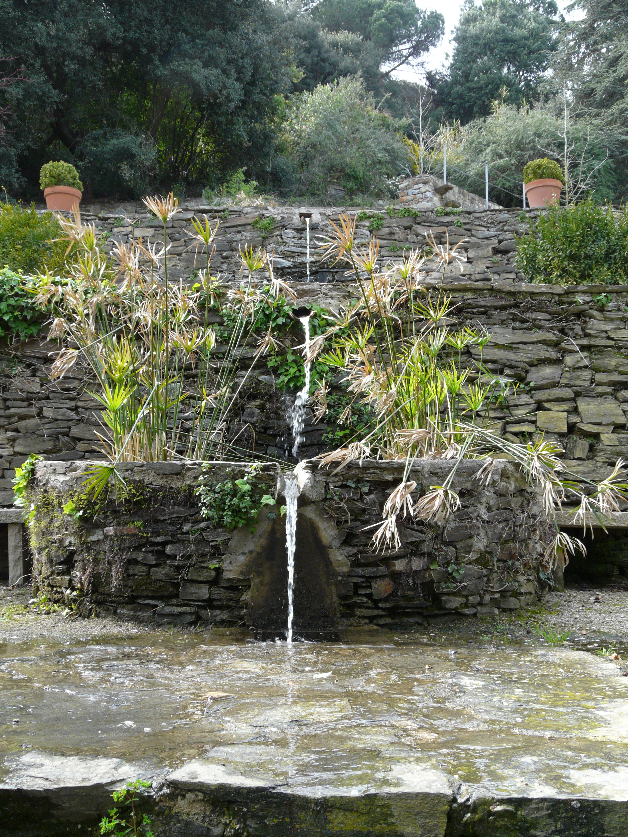 Fonts als Vivers de Can Borni